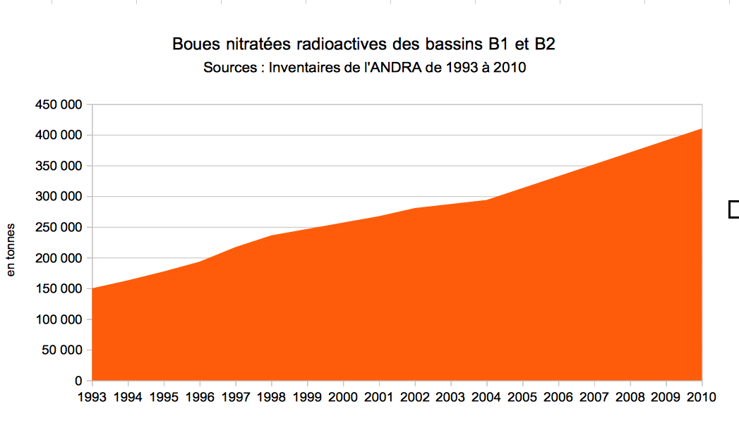 Ce graphique représente l'évolution du tonnage des boues nitratées radioactives dans les bassins B1 et B2 de l'usine de Malvési (Aude) entre 1993 et 2010